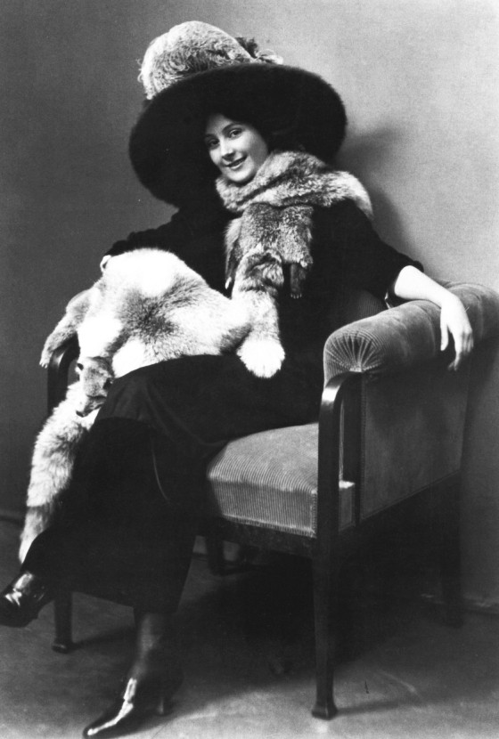 Schauspielerin Lil Dagover um 1913